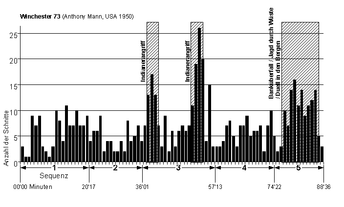 Schnittfrequenzgrafik des Filmes Winchester 73 (Anthony Mann, USA 1950) mit Einzeichnung und Beschreibung der hervorstechenden Sequenzen.